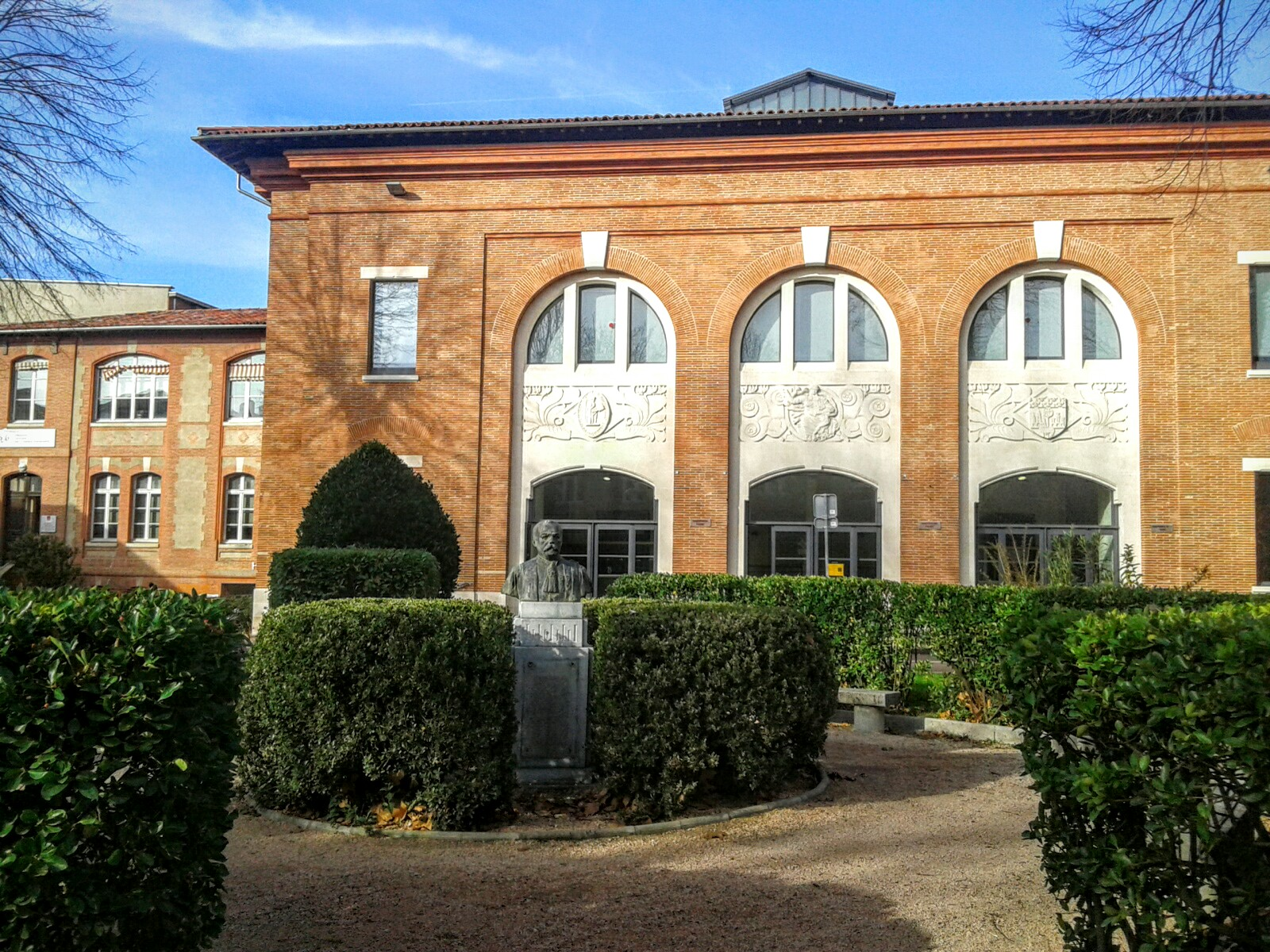 Amphi Cujas, Anciennes Facultés.